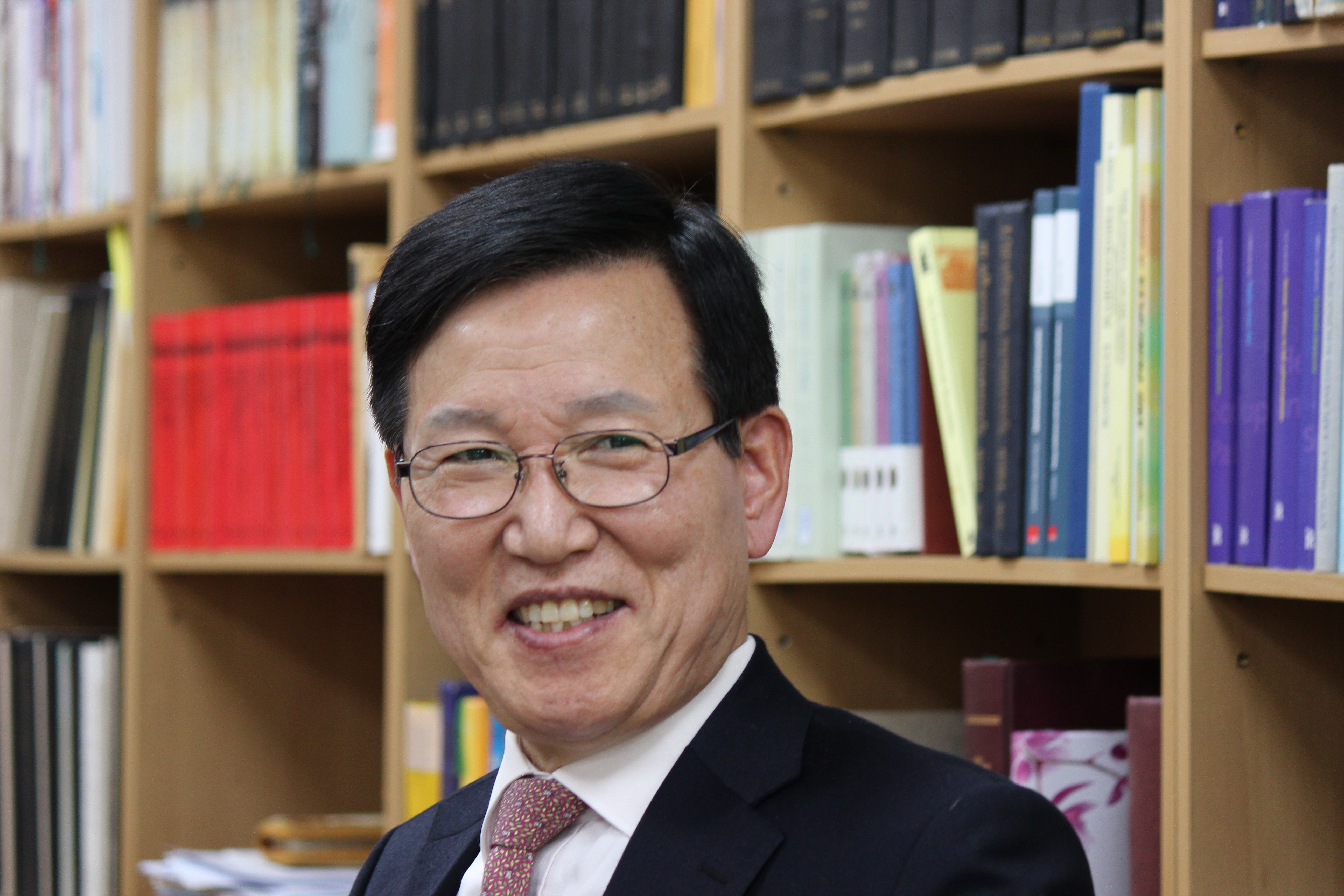 한국성경신학회 설교자로서 초청된 오덕교박사, 신반포중앙교회, 2018-3-5